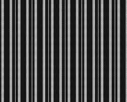 羽織